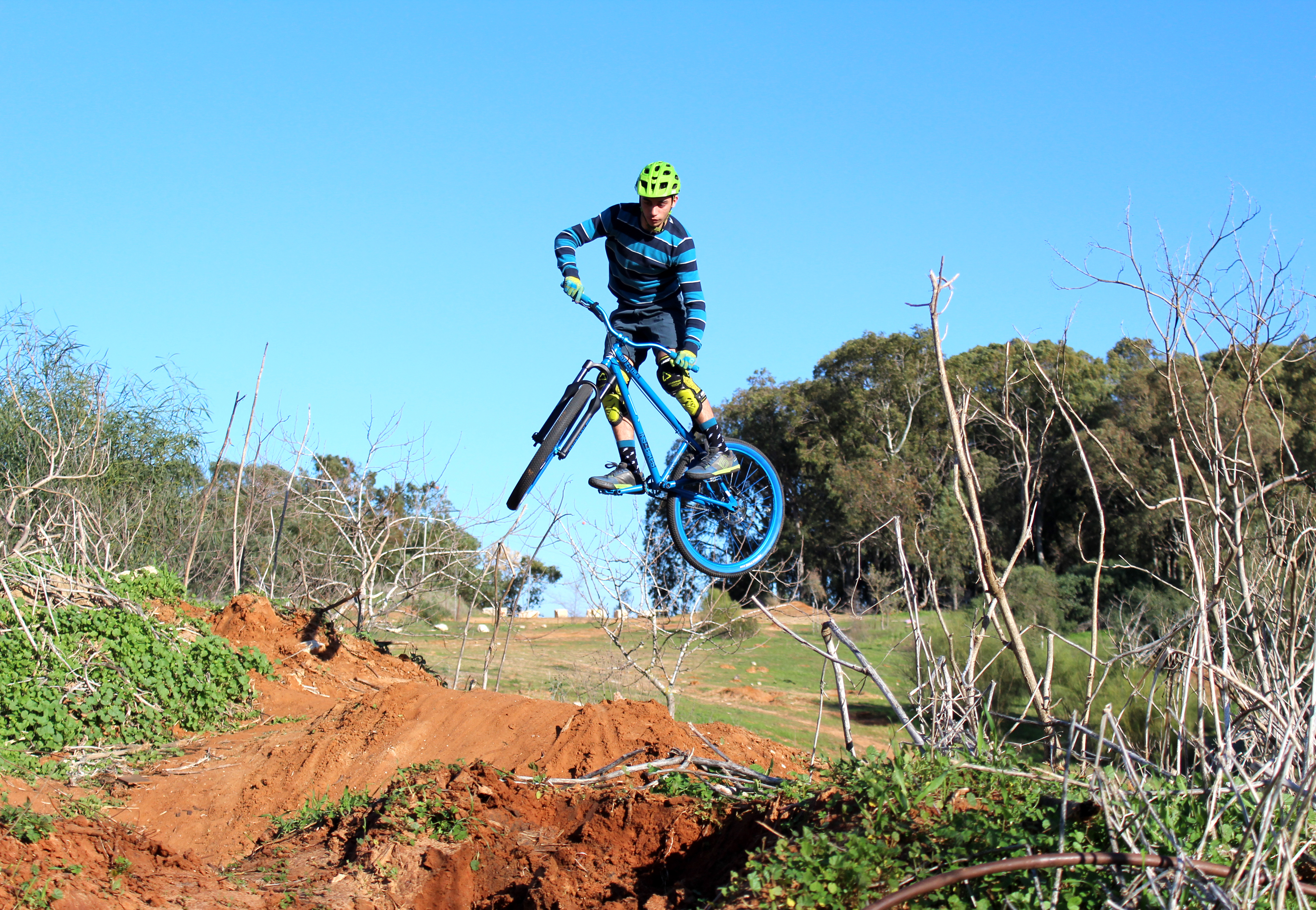 אופני הרים, נמרוד זליכה צילום תיכון רוטברג